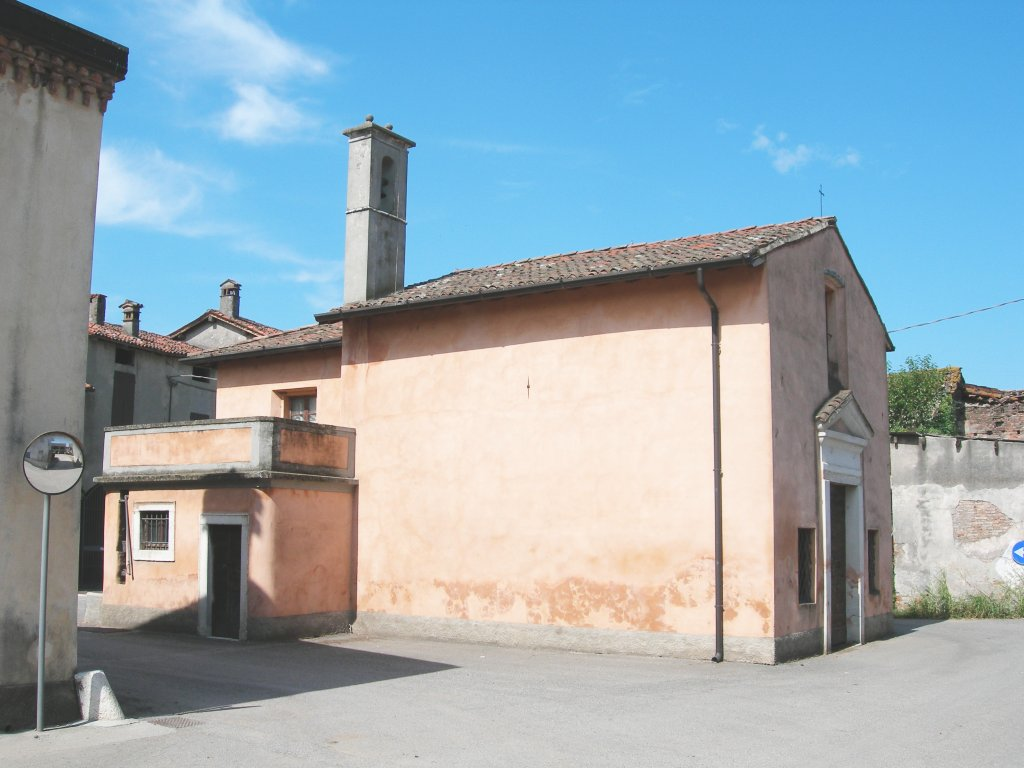 Facciata della Chiesa di Santa Maria Assunta presso la località Aspes in San Zeno Naviglio